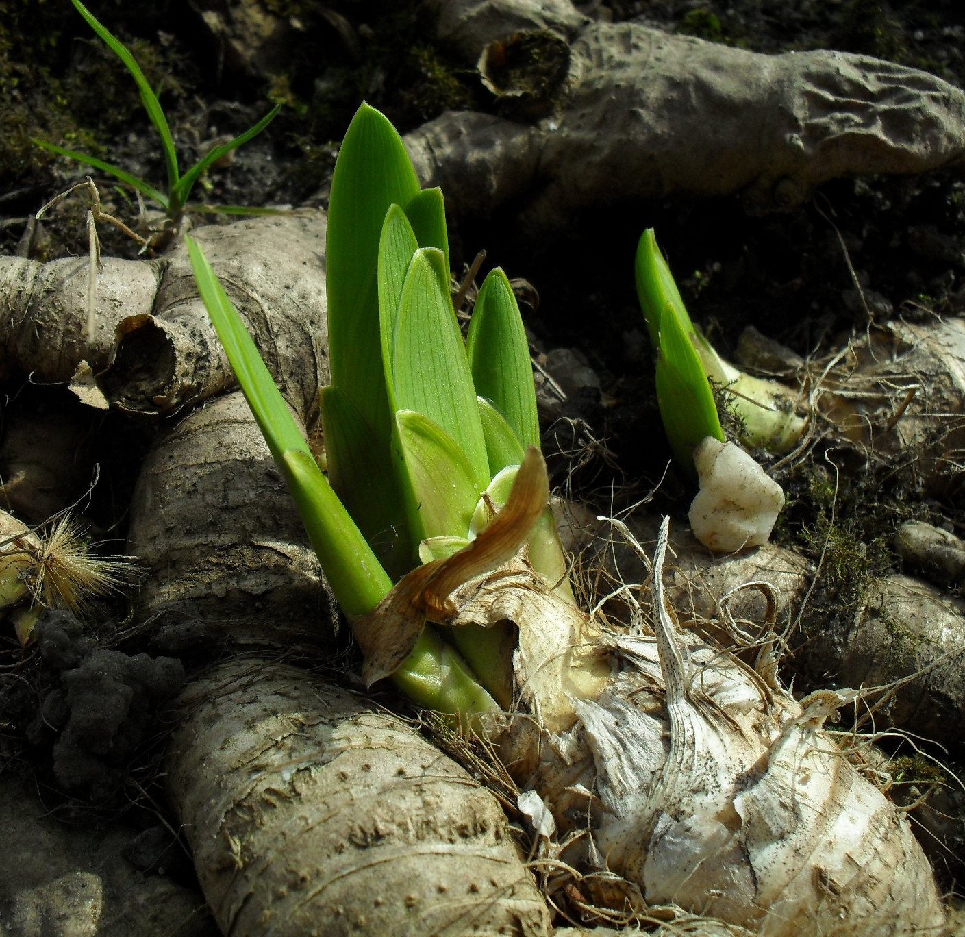 Iris imbricata - Botanischer Garten Leipzig